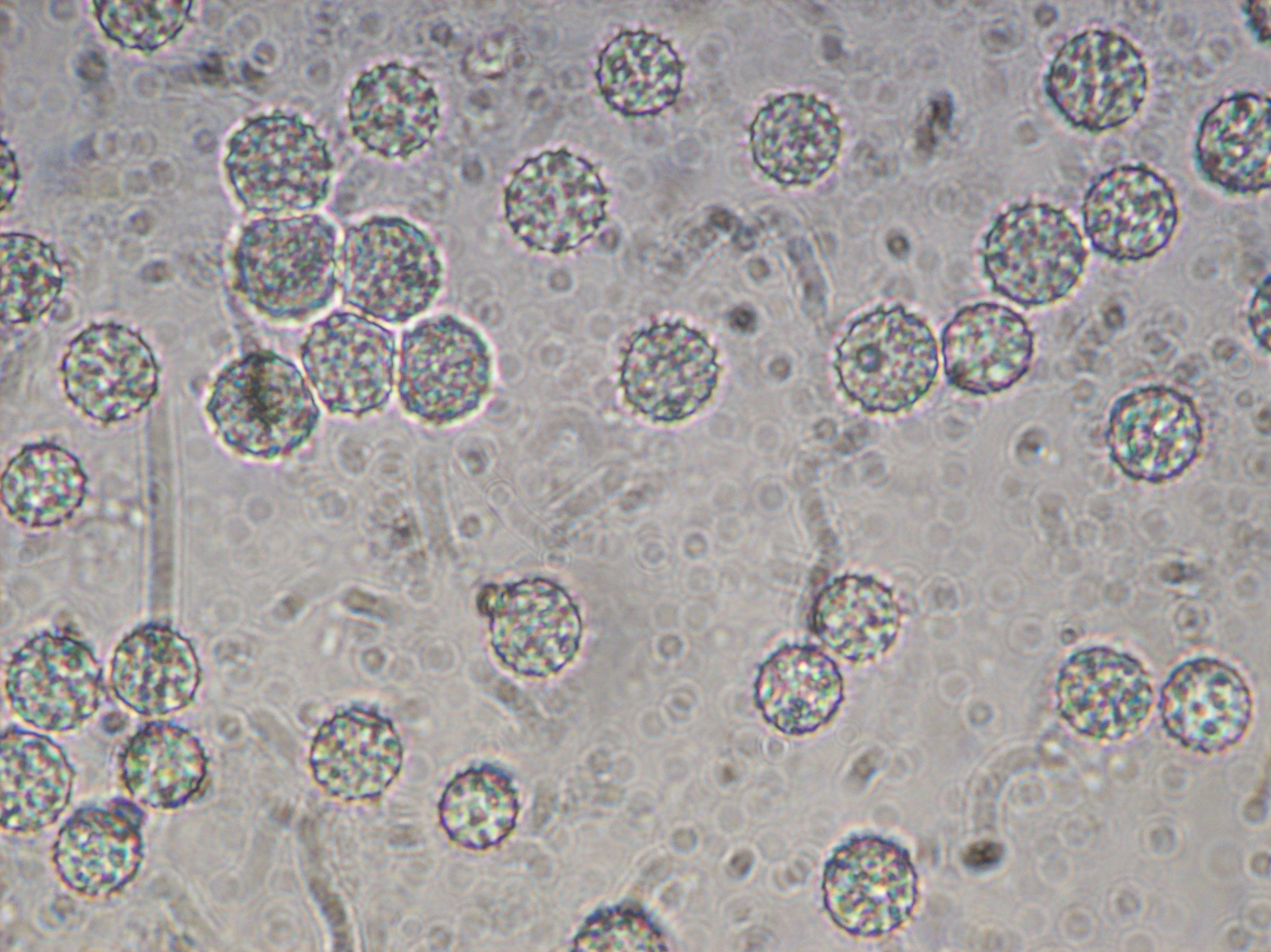 Laccaria laccata Sporen